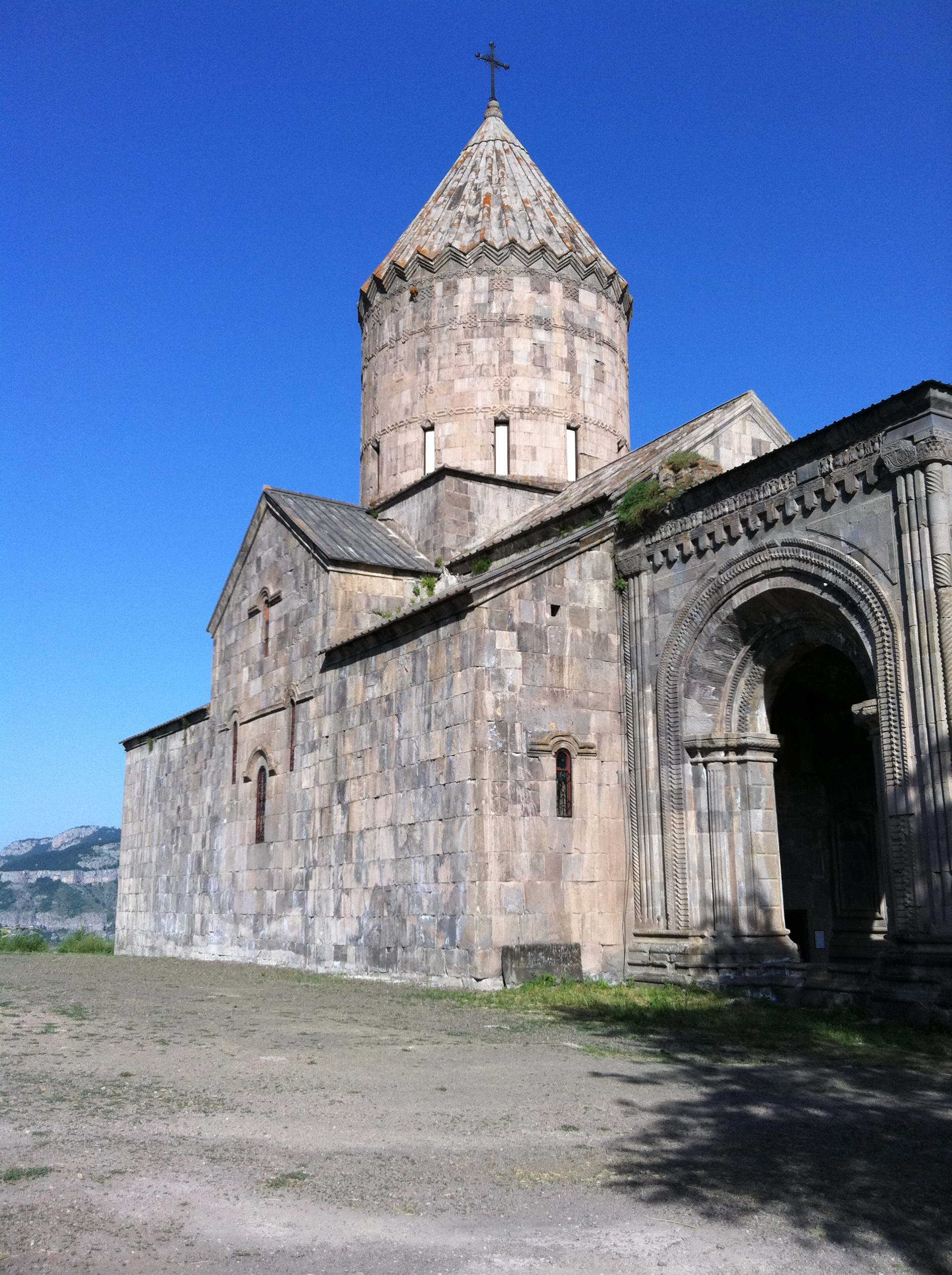 Tatev2